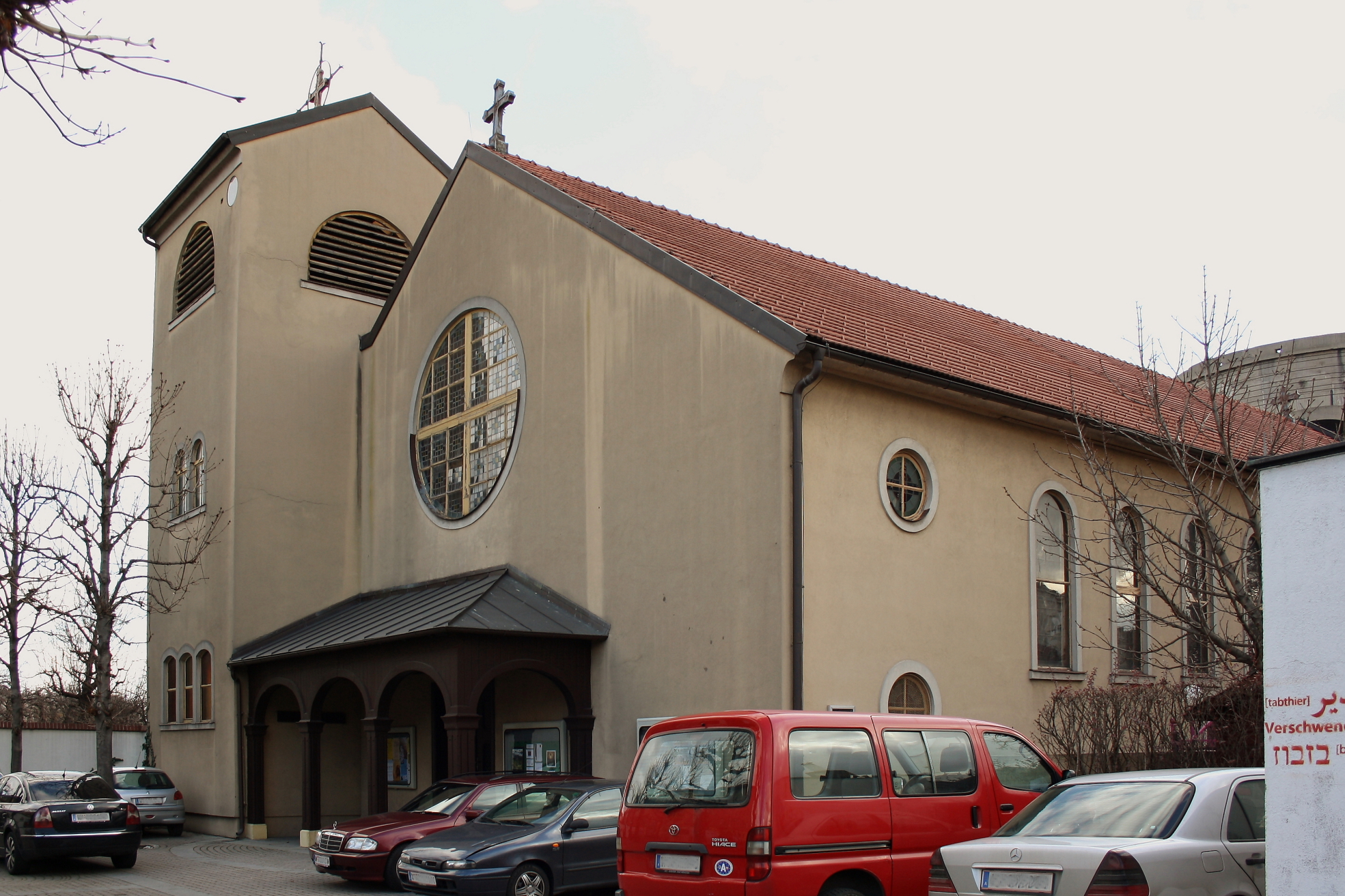 Die Muttergotteskirche im Augarten im 2. Wiener Gemeindebezirk Leopoldstadt.